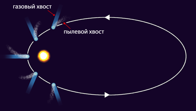 Орбита кометы и хвосты